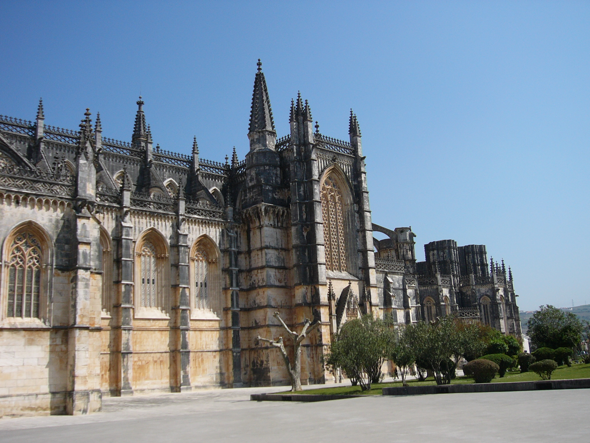 Parte del Monasterio de Batalha, en Portugal. Foto de Manuel González Olaechea y Franco ©